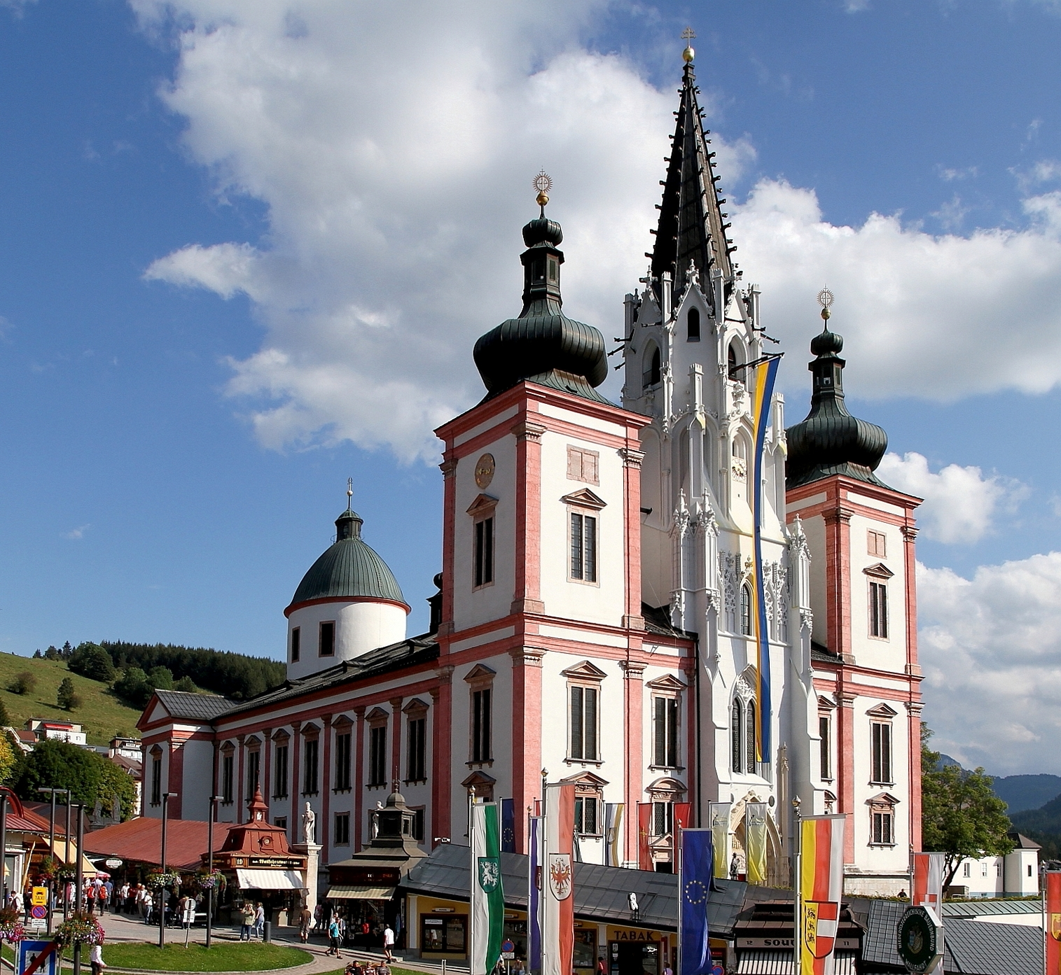 Die Nordwestansicht der Basilika, Pfarr- und Wallfahrtskirche Maria Geburt in der obersteirischen Stadt Mariazell.